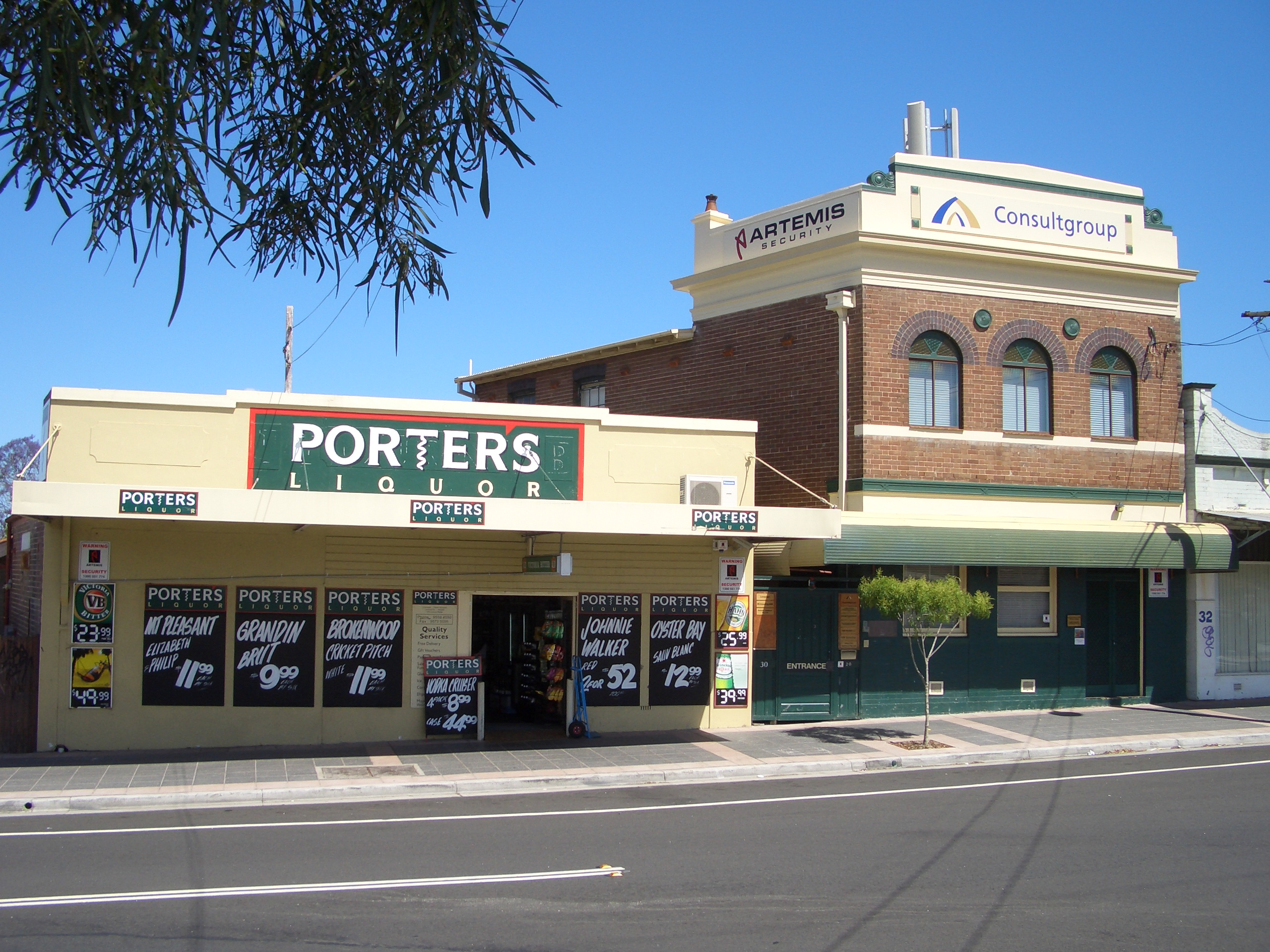 Hurlstone Park